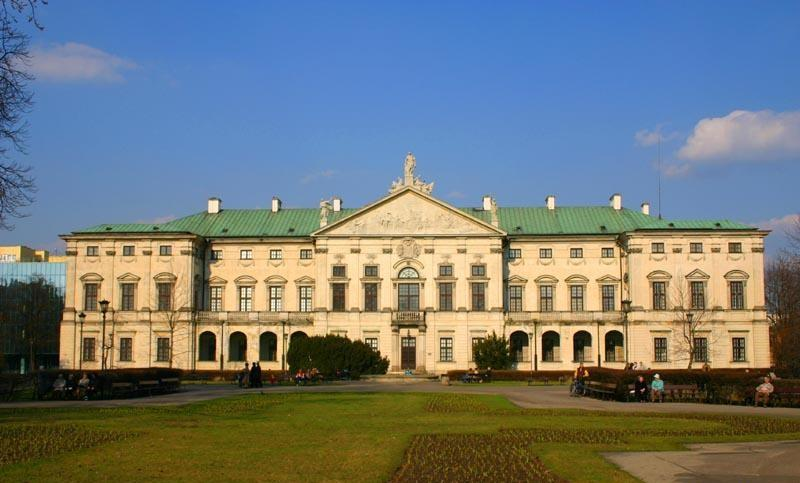 Warszawa (Polska)